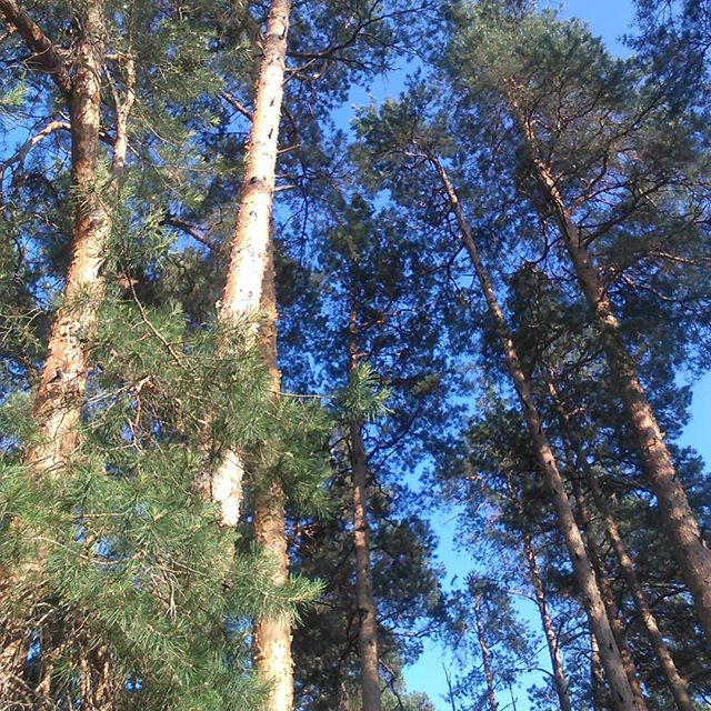 Национальный парк «Смольный»: В национальный парк вошла территория северо-восточной возвышенной части Мордовии, охватывающая левобережье реки Алатырь, Большеигнатовский район, Мордовия This image is related to the protected area of Russia number 1300026